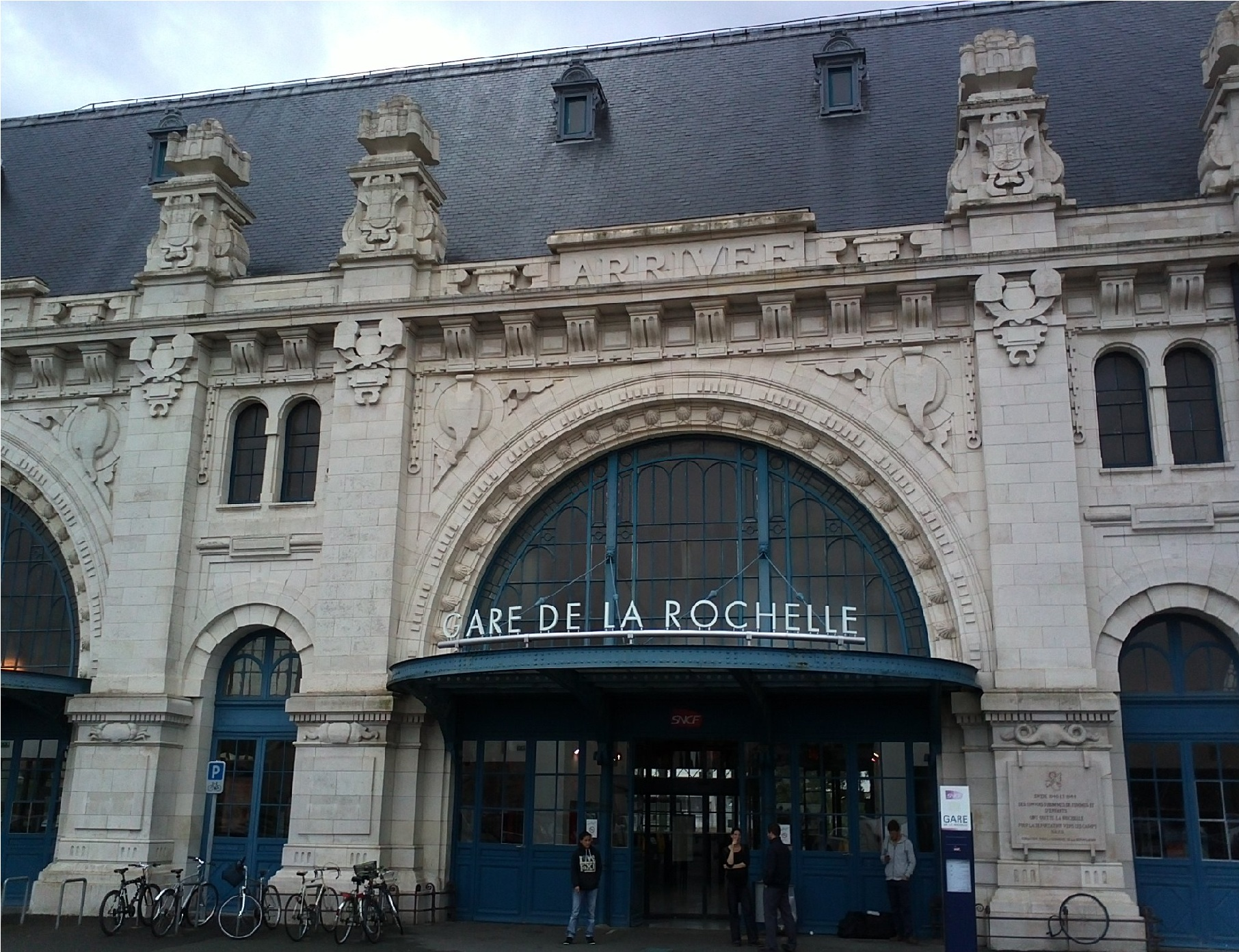 拉罗谢尔站进站口